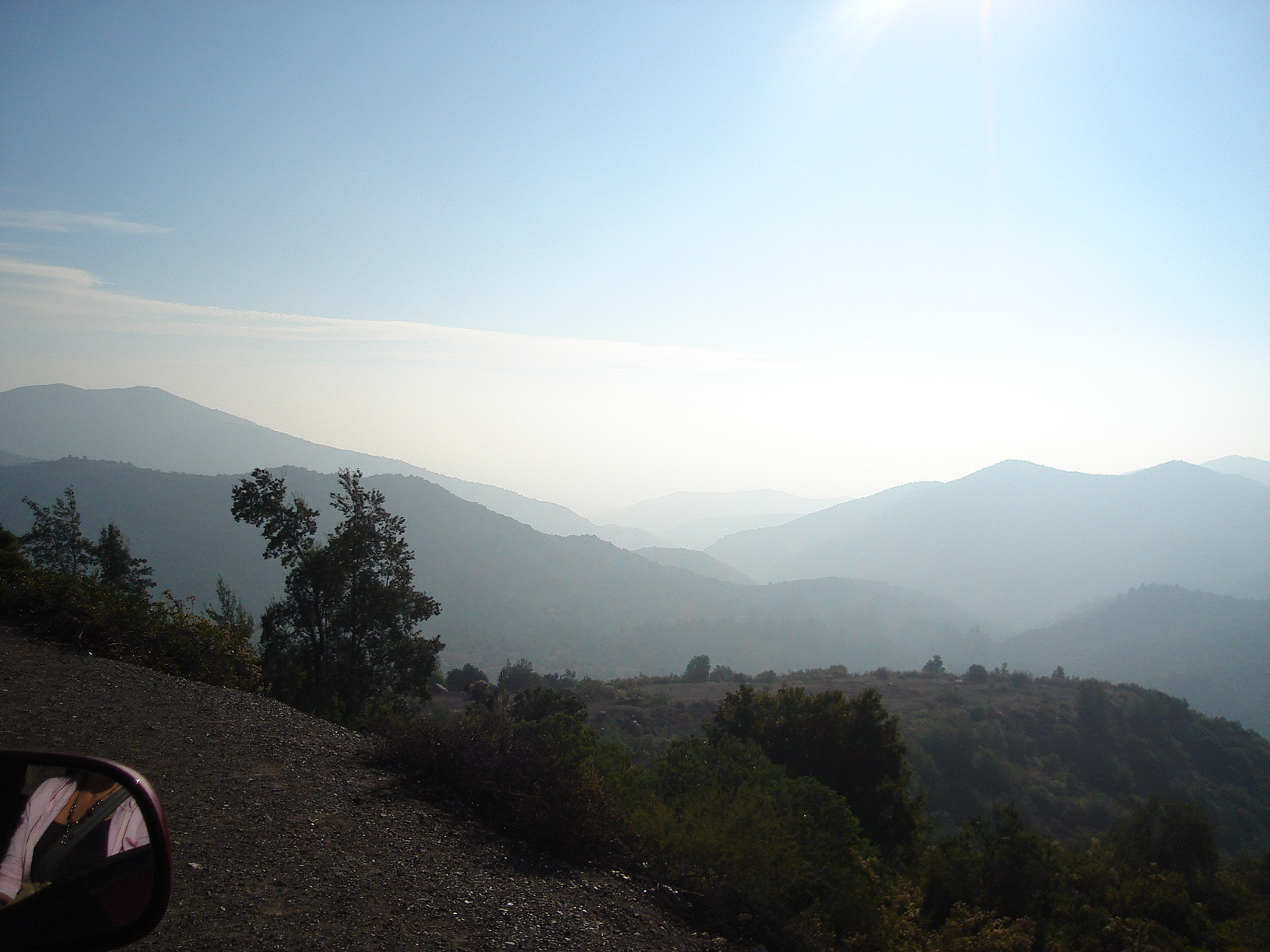 Cuenca de Rancagua invadida por contaminación ambiental. Tomada por Marco Correa (yo) el 1 de abril de 2007.